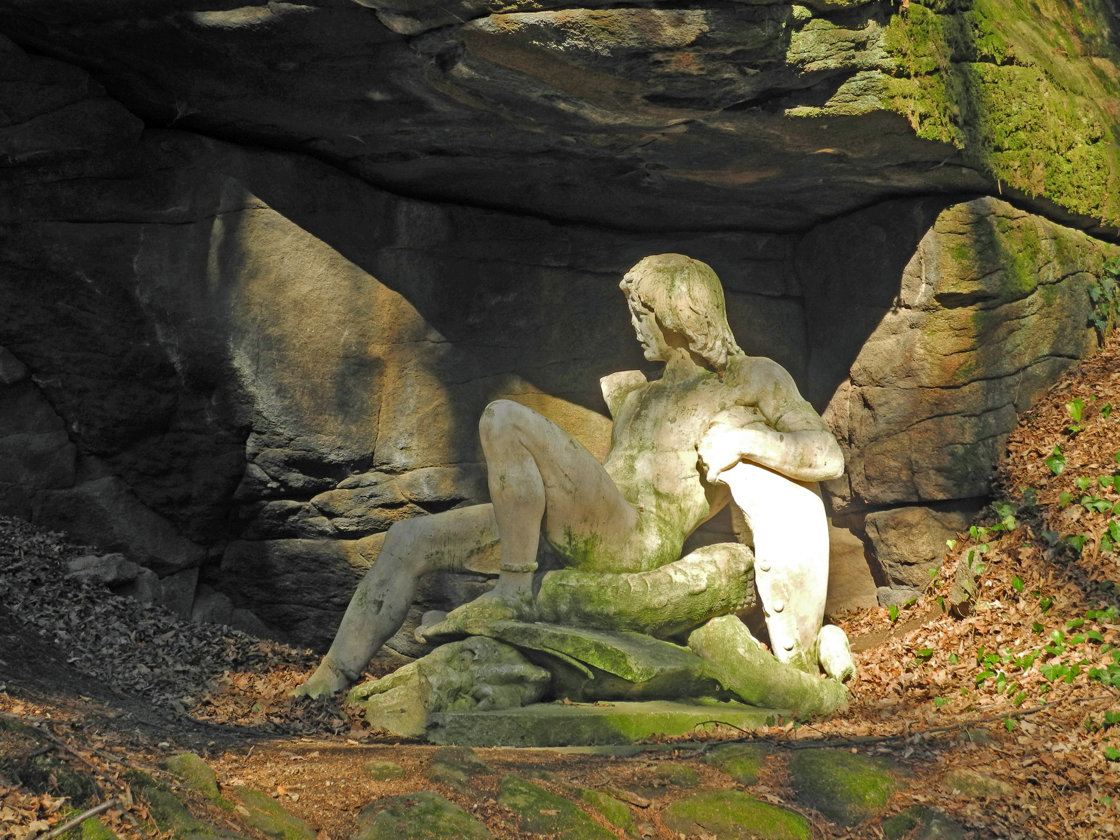 Skulptur des "Siegfried" (nach R. Wagner) von Heinrich Natter (1844–1892) in der Drehsaer Schweiz